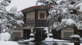 興国寺（長岡市）山門から本堂を眺める